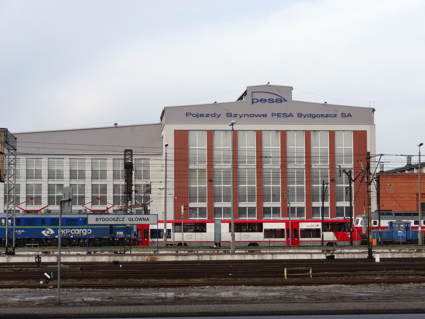 Hala montażowa zakładów Pojazdy Szynowe Pesa w Bydgoszczy. Widok od ul. Zygmunta Augusta